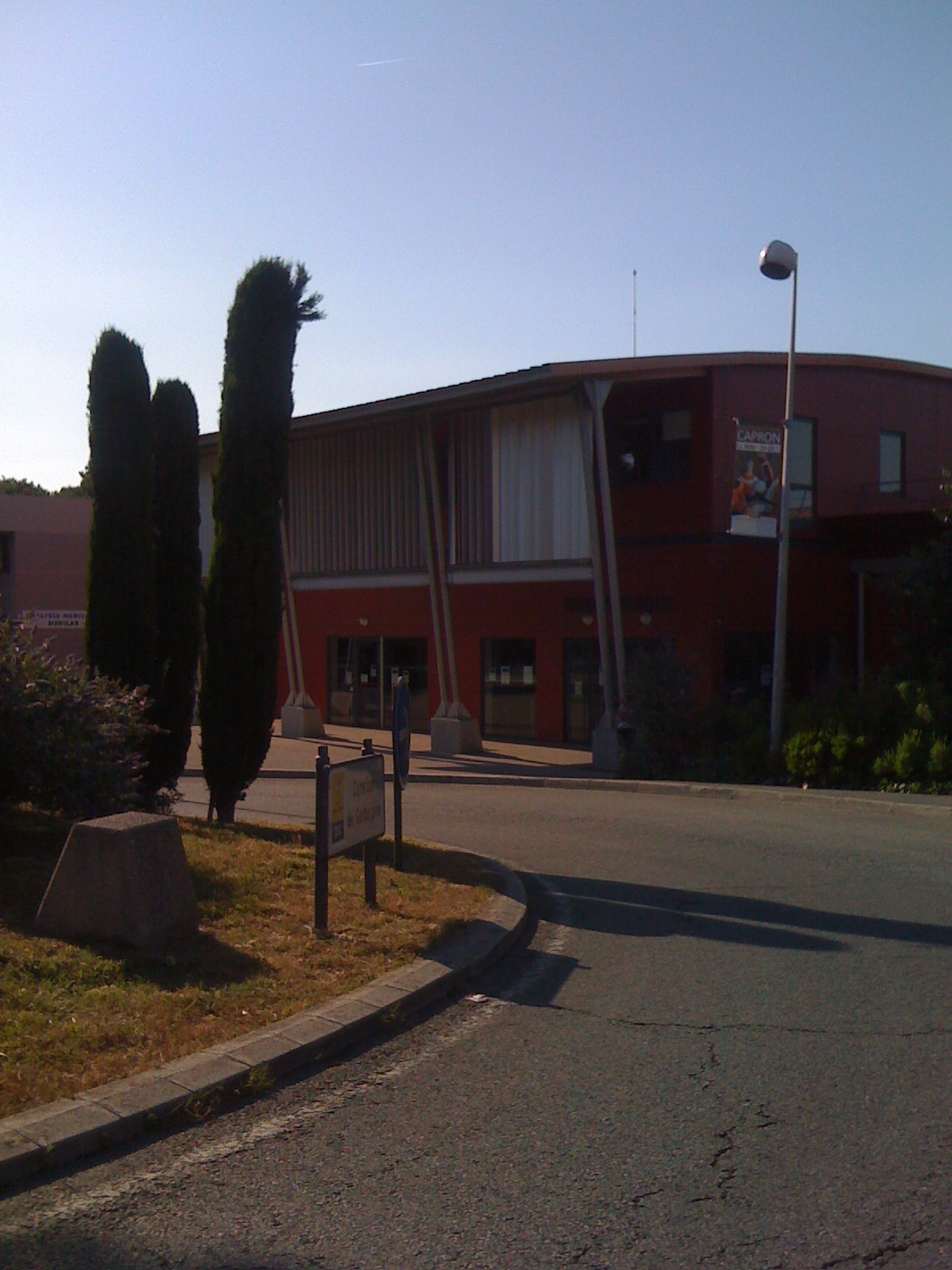 infrastructure créée par la Communauté d'Agglomération de Sophia Antipolis